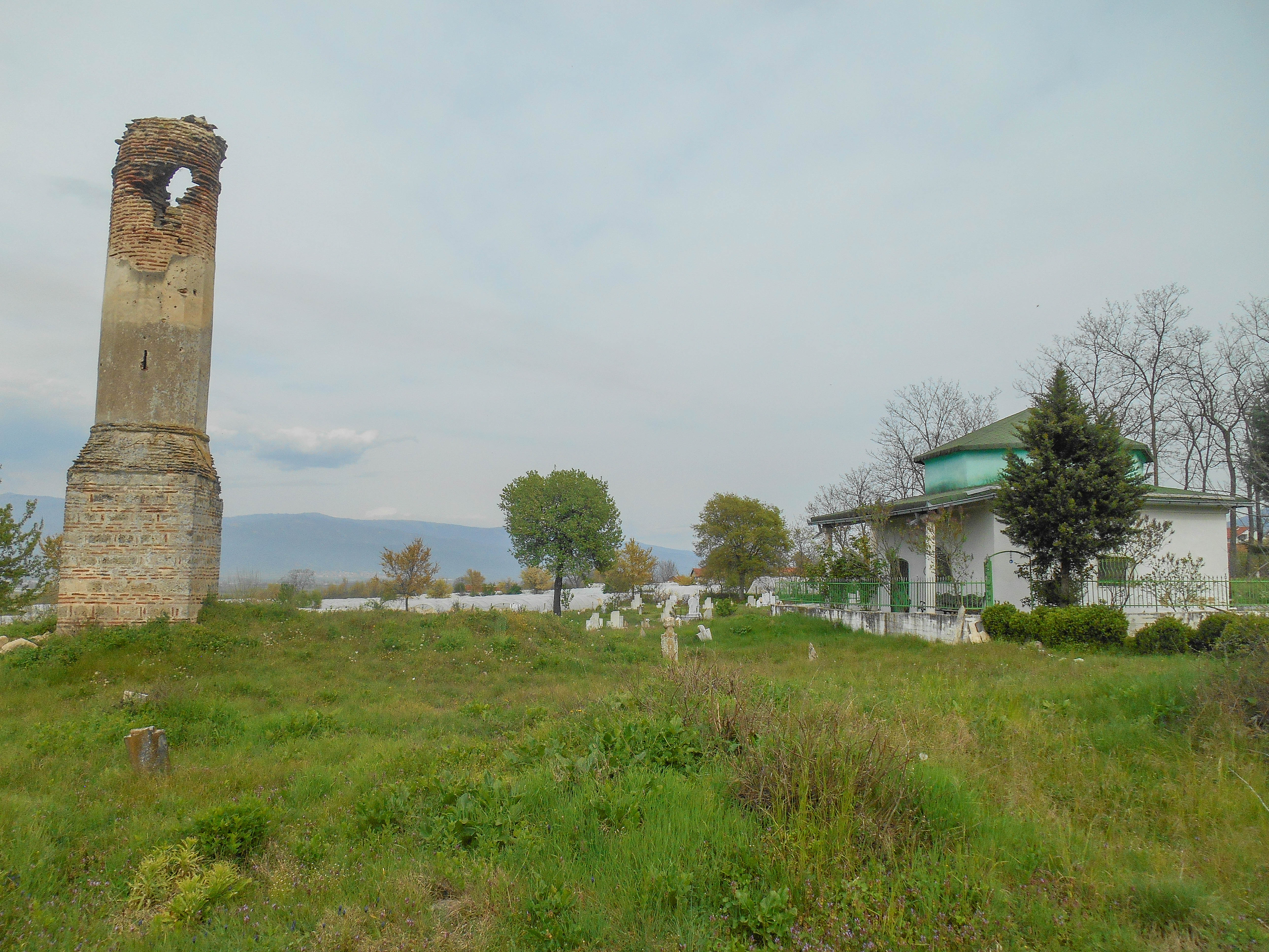 Старата џамија во селото